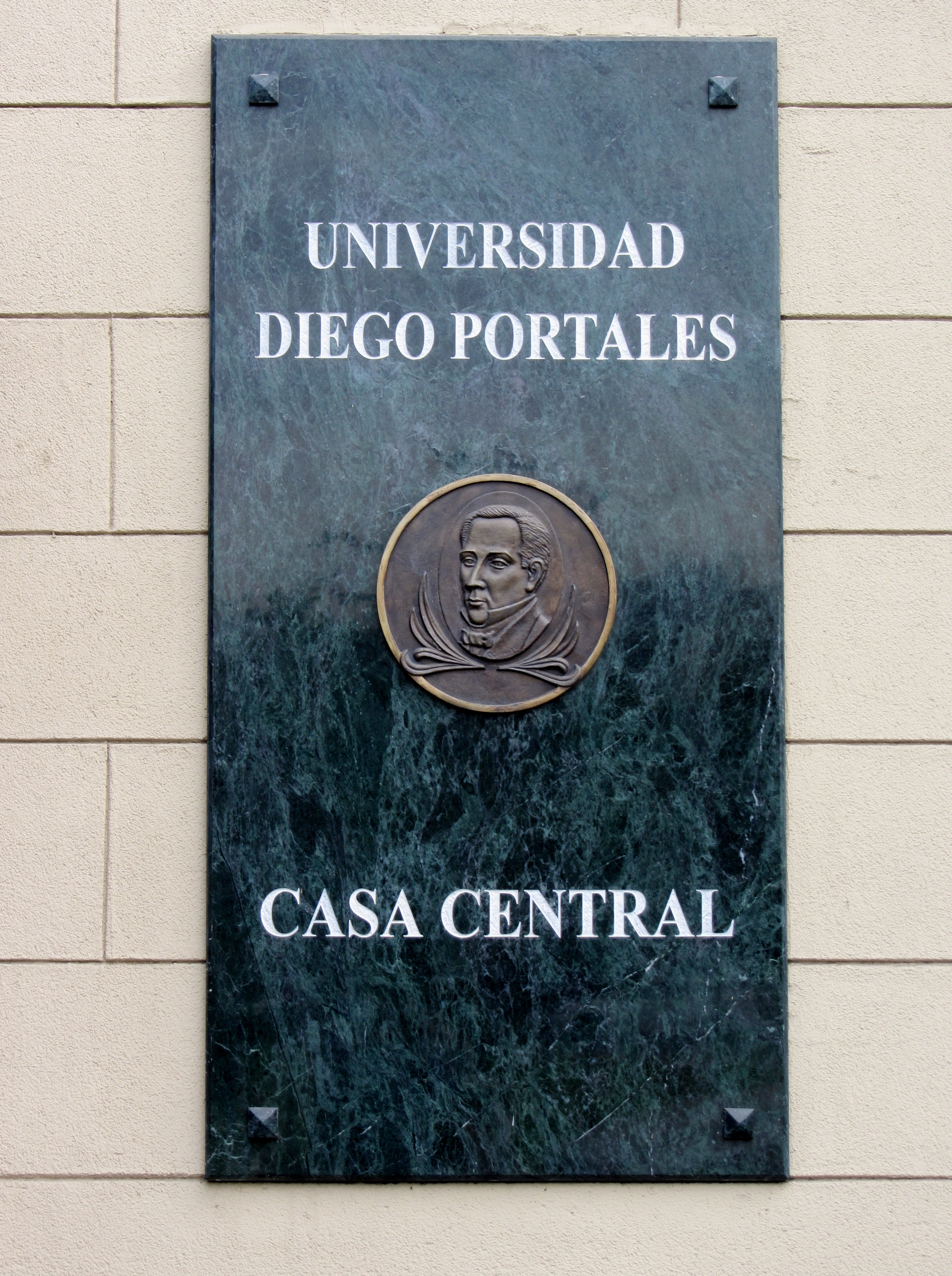 Placa en la Casa Central de la Universidad Diego Portales, costado calle Manuel Rodríguez